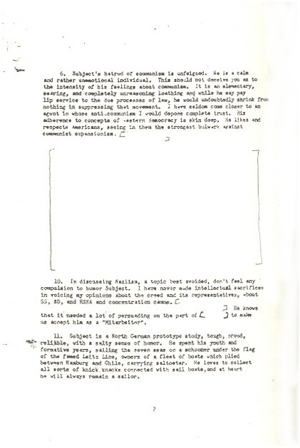 Interner Bericht der CIA über Theo Saevecke vom 8. Januar 1953 Zitat aus Vorblatt des Buches zur Lizensierung: „Except the Preface, Introduction and Conclusion, this is a work of the United States governement and is not protected by copyright in the United States.” -Klammern im Dokument markieren von der CIA vor Veröffentlichung unkenntlich gemachte Stellen. Die dritte Seite des Berichts enthält durch die eingeschränkte Veröffentlichung keine Informationen, verdeutlich allerdings den Umfang der von der CIA unkenntlich gemachten Stellen.